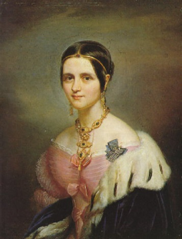 Софья Евграфовна Комовская, ур. гр. Комаровская (1811—1858), изображена с фрейлинским шифром императриц Марии Фёдоровны и Александры Фёдоровны, фрейлина двора с 21 апреля 1828 года.